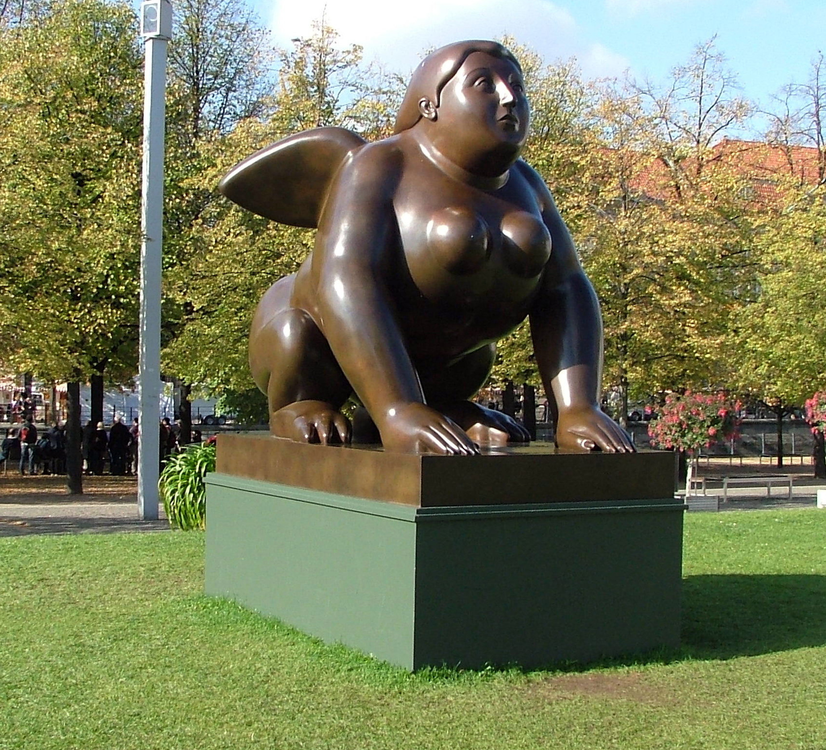 Botero Berlin